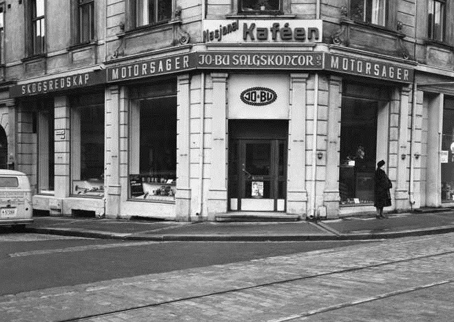 forretningsgård, hjørnegård, Jo-Bu motorsager og skogsredskap, Nasjonalkaféen.